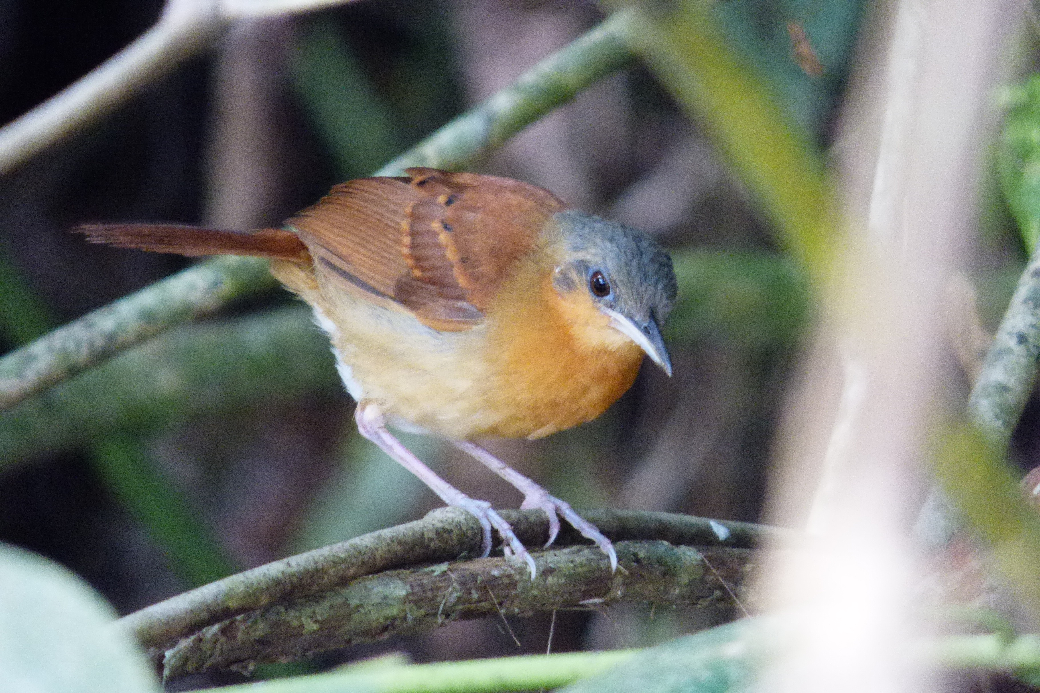 Myrmeciza longipes (Hormiguero pechiblanco) - Hembra (5)